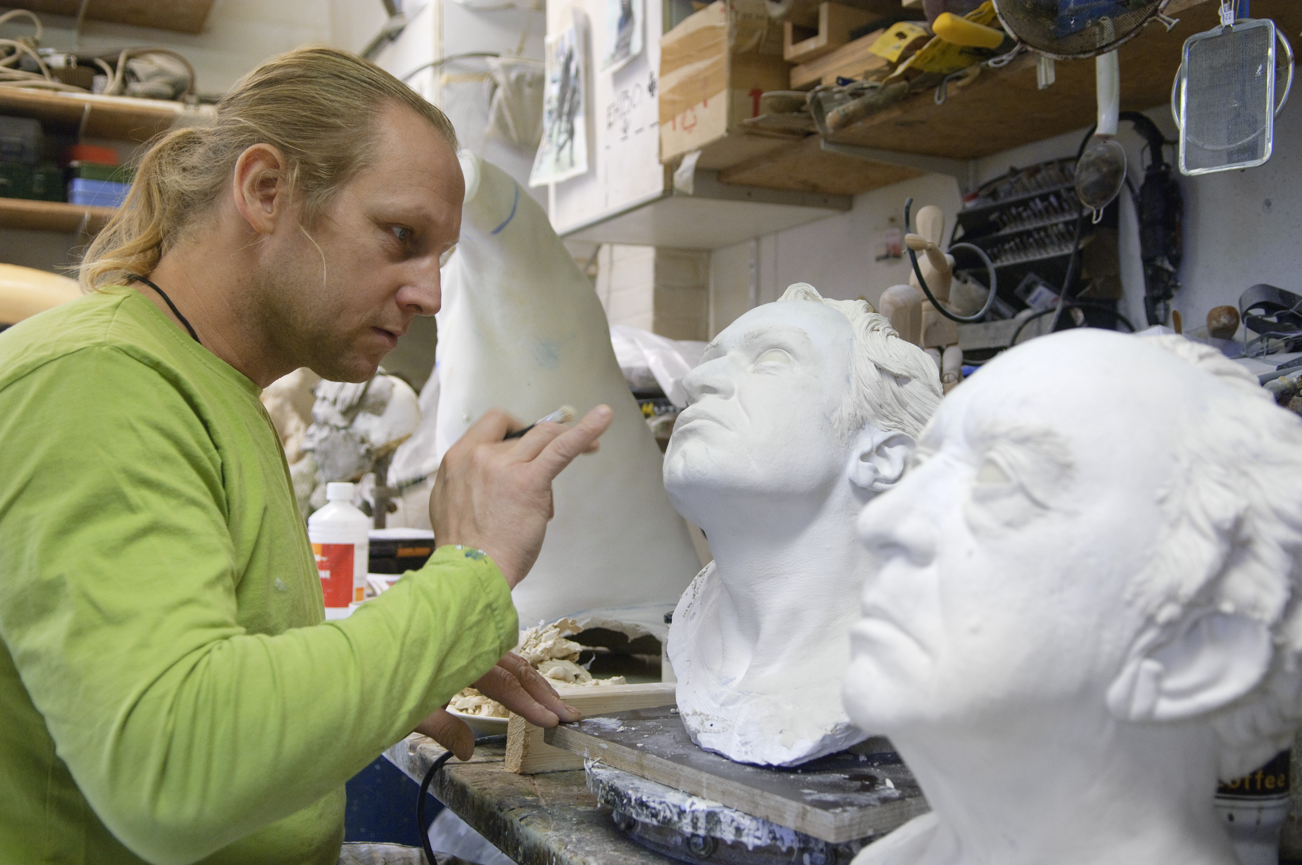 Rijksdienst voor het Cultureelerfgoed/ Kunstwerk: Beeldend kunstenaar werkend aan sculptuur in het attelier van Guido Geelen. (opmerking: Het kunstwerk bevindt zich in de hal van de Rijksdienst voor het Cultureel Erfgoed te Amersfoort en werd onthuld tijdens de opening van het nieuwe gebouw van de Rijksdienst voor het Cultureel Erfgoed te Amersfoort in mei 2009 door Guido Geelen zelf.)